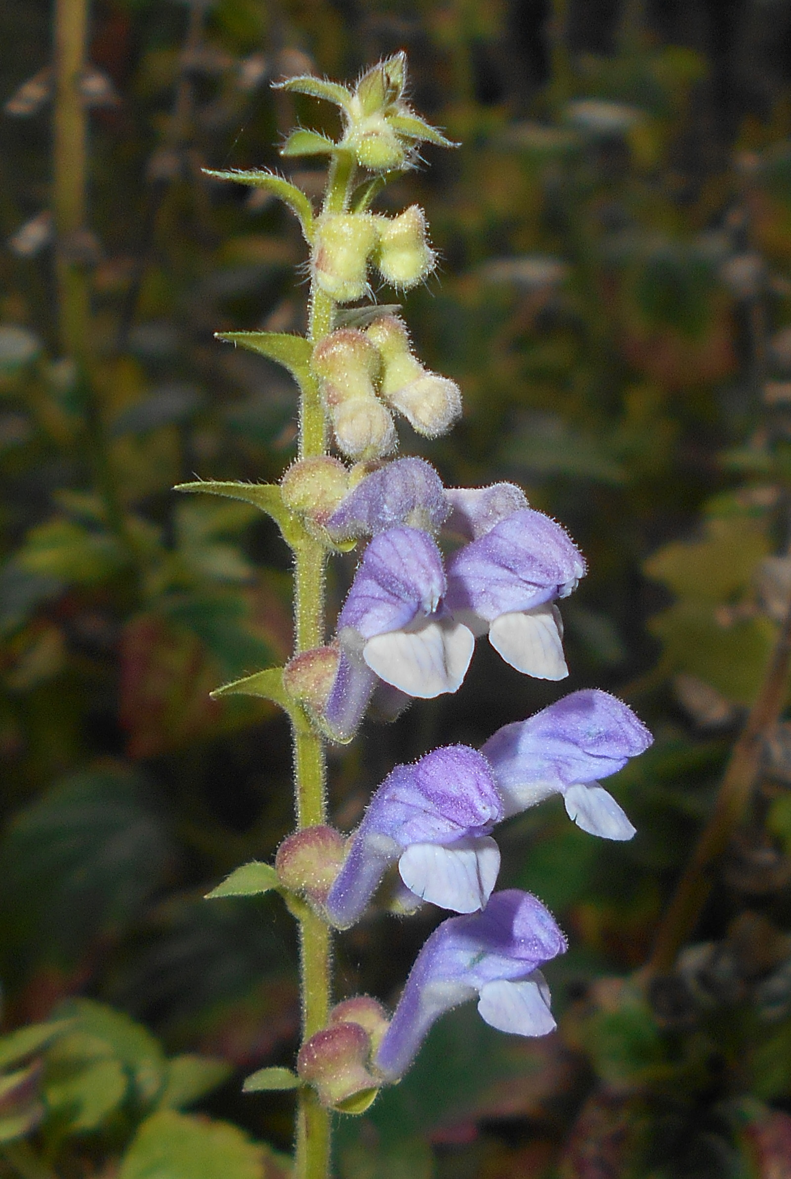 Scutellaria rubicunda, Ogród Botaniczny UMCS w Lublinie.